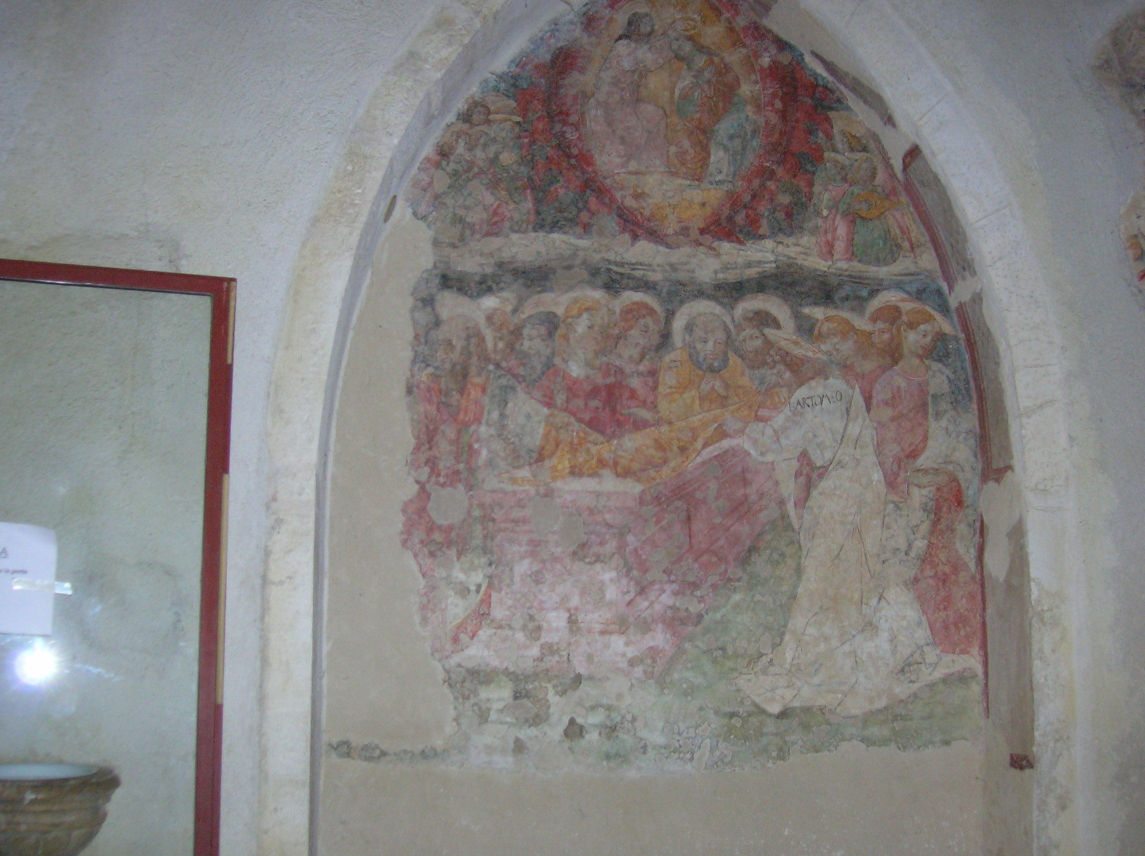 Assergi (credo)